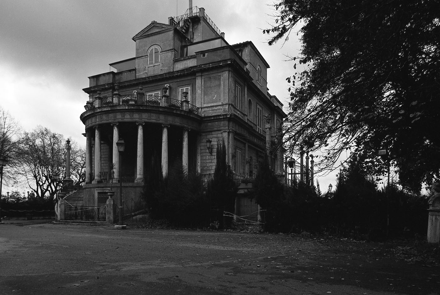 La Casina Valadier nel 2000